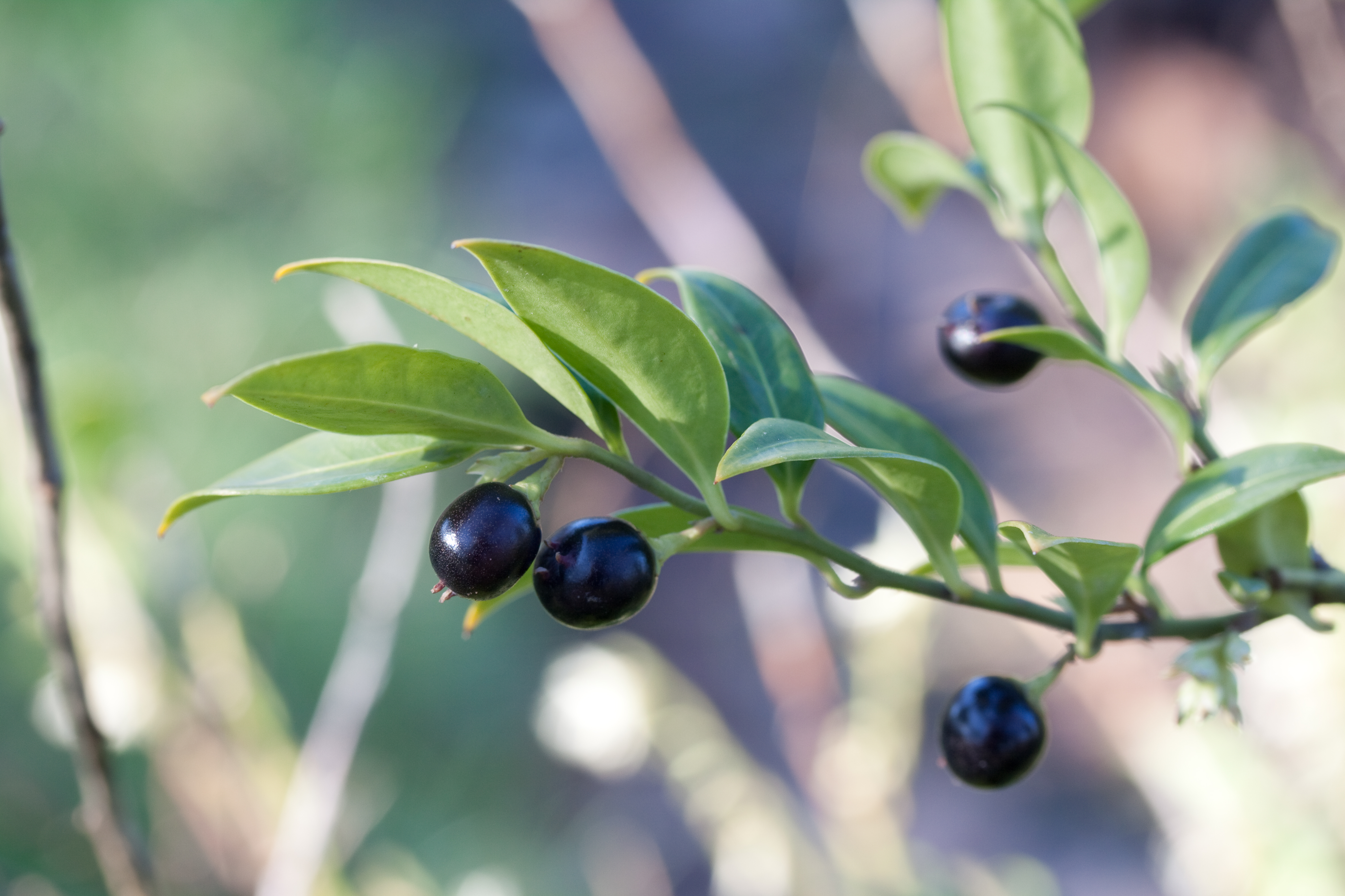 Sarcococca hookeriana Baill. - Fruits - Jardin des Plantes - Paris - France